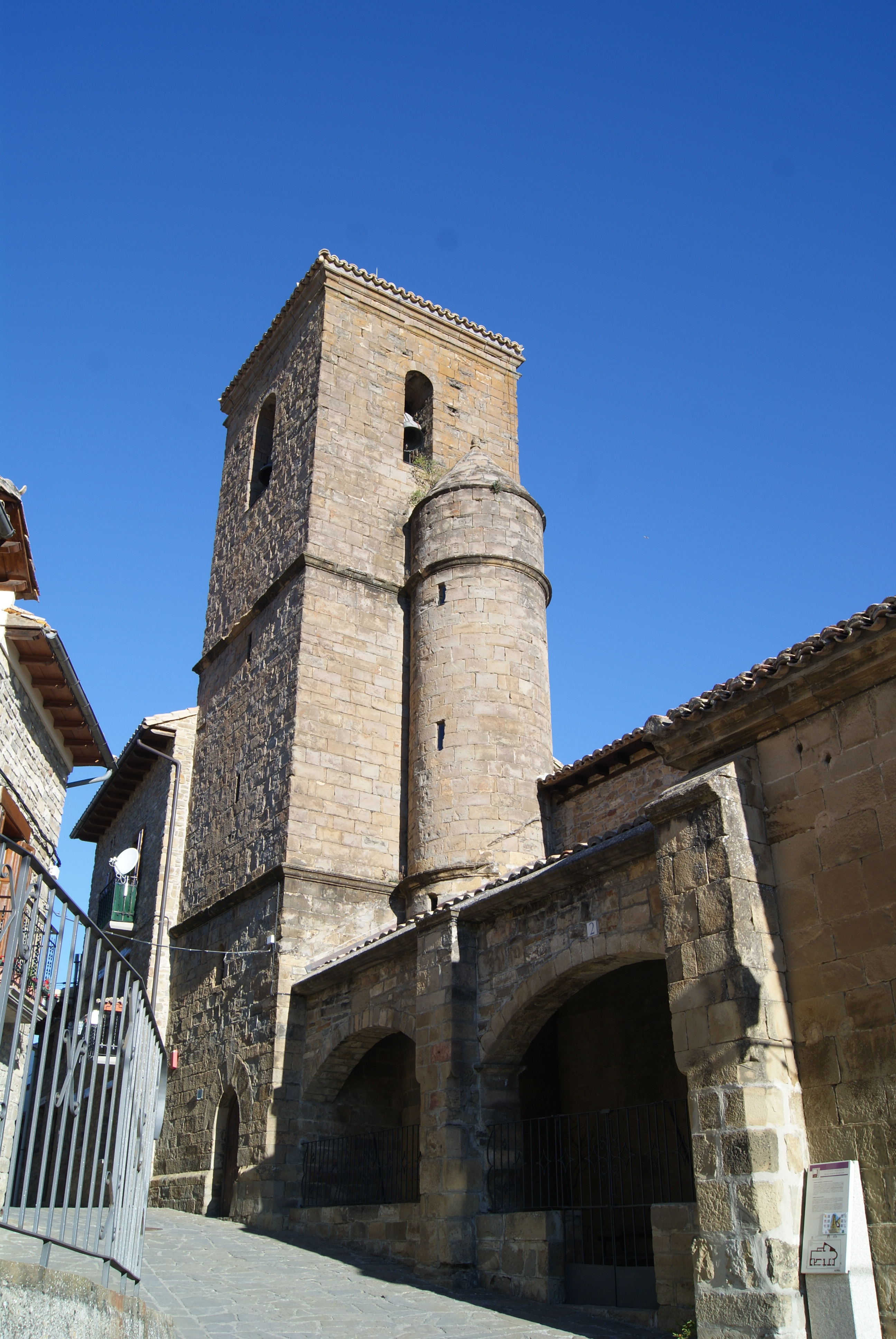 Artieda (Zaragoza)